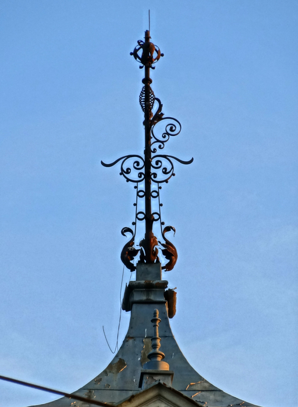 Willa fabrykanta, właściciela Fabryki Obrabiarek do Drewna Carla Blumwe - ul. Nakielska 53 w Bydgoszczy (1891)